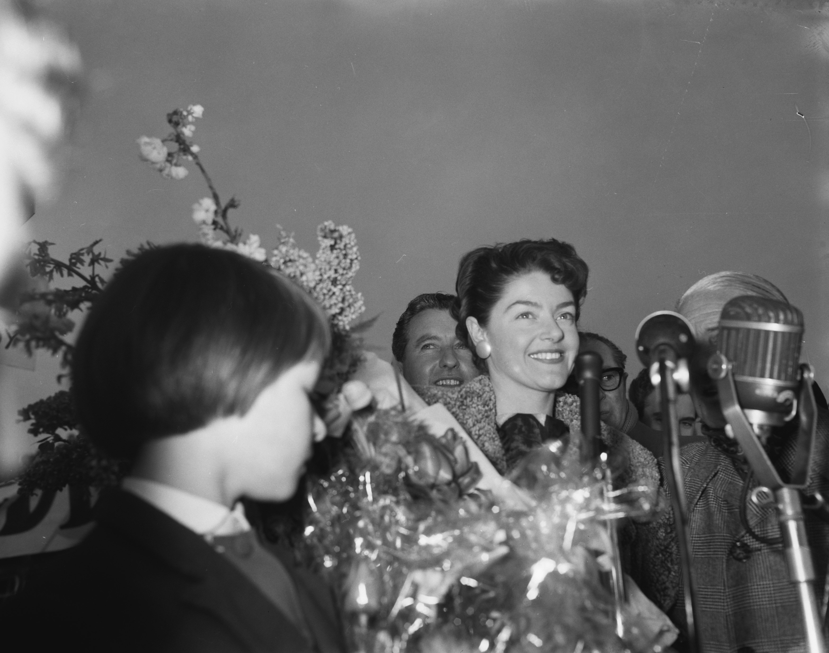 Collectie / Archief : Fotocollectie Anefo Reportage / Serie : [ onbekend ] Beschrijving : Aankomst Teddy Scholten, winnares Eurovisie Songfestival 1959, uit Cannes op Schiphol. Begroeting op het platform Datum : 12 maart 1959 Locatie : Noord-Holland, Schiphol Trefwoorden : artiesten, muziek, publiek, songfestivals, vliegvelden Persoonsnaam : Scholten, Teddy Fotograaf : Rossem, Wim van / Anefo Auteursrechthebbende : Nationaal Archief Materiaalsoort : Negatief (zwart/wit) Nummer archiefinventaris : bekijk toegang 2.24.01.04 Bestanddeelnummer : 910-2094